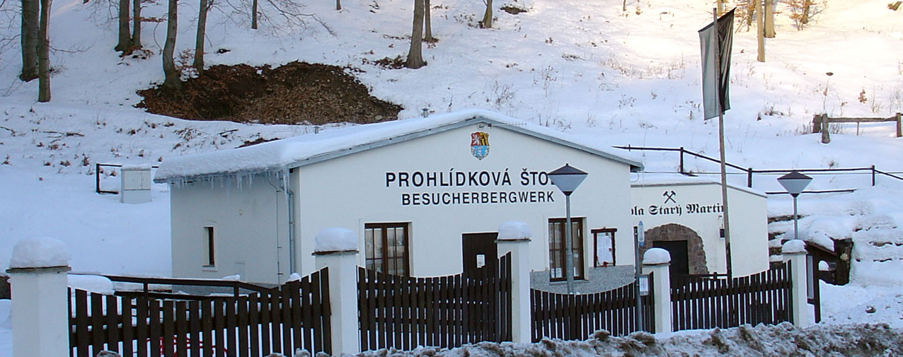 Graupen: Bergwerksstollen Alter Martin